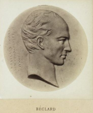 Pierre-Augustin Béclard, médaillon par David d'Angers in Les médaillons de David d'Angers réunis et publiés par son fils David d'Angers, Robert (1833-1912) 1867 BNF/Gallica